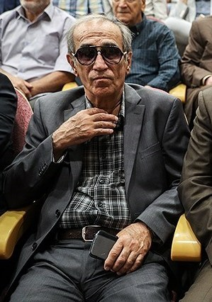 مراسم معارفه استراماچونی سرمربی جدید تیم استقلال